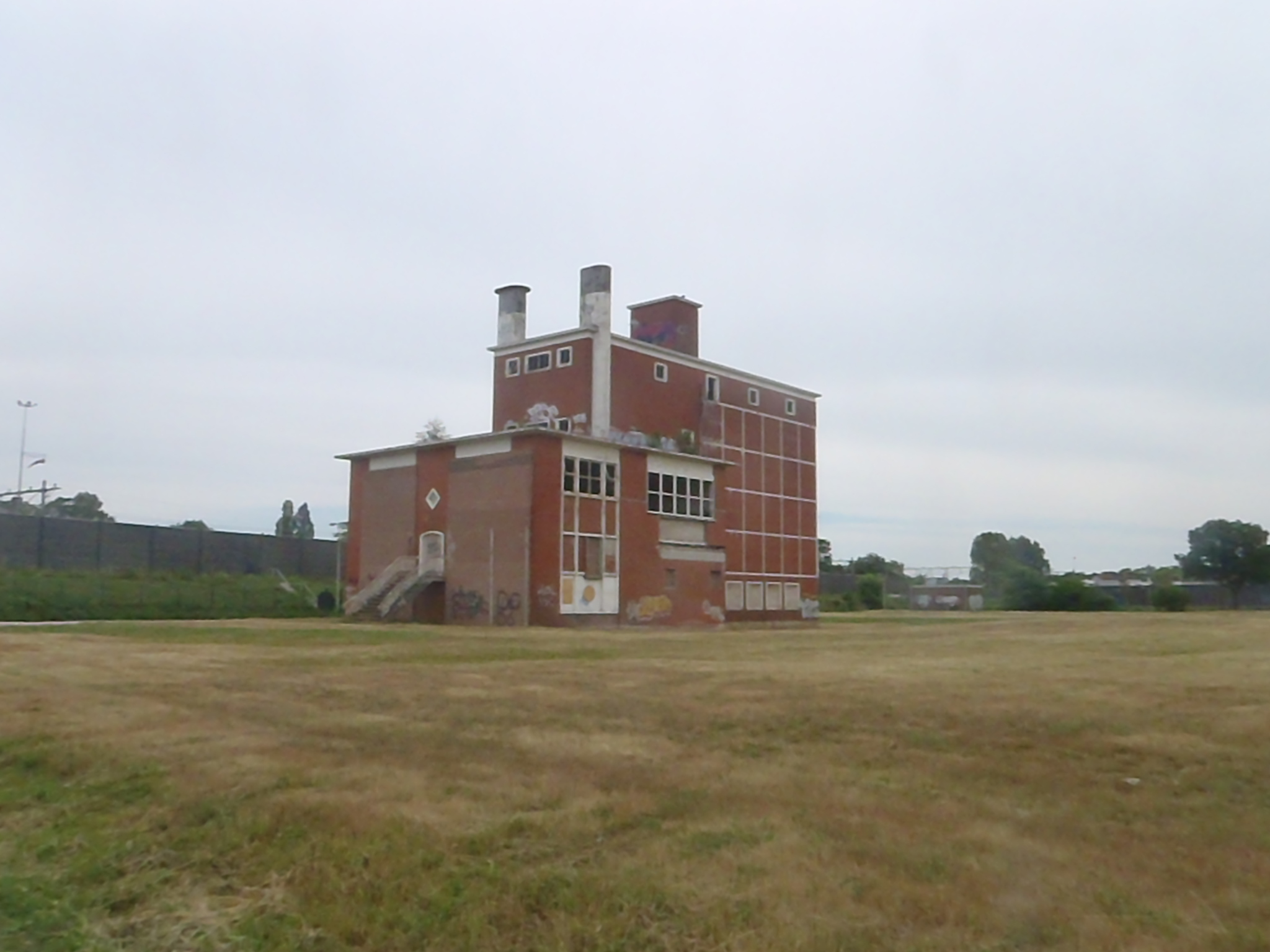 het oude silogebouw van de hengelosche bierbrouwerij het enige wat over is van de brouwerij